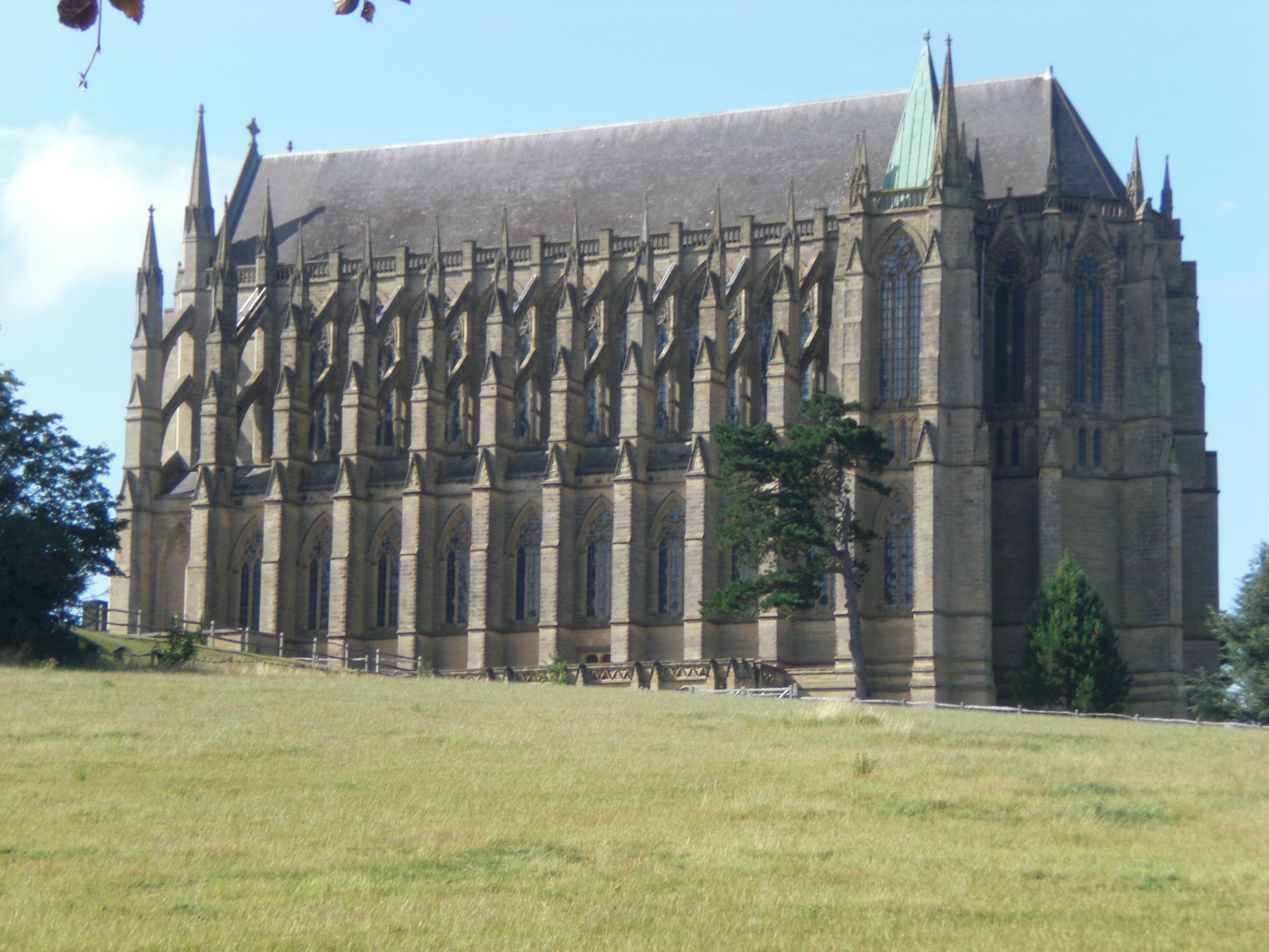 Lancing Chapel, West Sussex